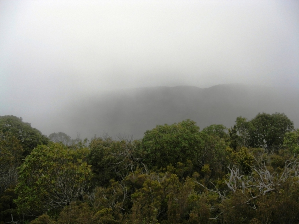 Cima del Cerro Oncol en un día de lluvia, Valdivia, Chile. Valdivian temperate rainforest en Parque Oncol, Cordillera de la Costa.